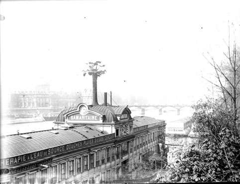 Bains de la Samaritaine, Paris, avril 1898 Fonds Trutat - Photographie ancienne Cote : TRU C 1737 Localisation : Fonds ancien (S 30) Original non communicable Titre : Bains de la Samaritaine, Paris, avril 1898 Auteur : Trutat, Eugène Rôle de l’auteur : Photographe Lieu de création : Paris (France) Date de création : 1898 Mesures : : 7 x 9 cm Observations : Note manuscrite de Trutat : " Paris : Bains de la Samaritaine, avril 1898 ". Mot(s)-clé(s) : -- Architecture sanitaire -- Thermes -- Vu d'en haut -- Toit -- Fleuve -- Bâtiment -- Bains de la Samaritaine (Paris) -- Paris (France) -- Ile-de-France (France) -- 19e siècle, 4e quart Médium : Photographies -- Négatifs sur plaque de verre -- Noir et blanc -- Vues de ville Bibliothèque de Toulouse. Domaine public